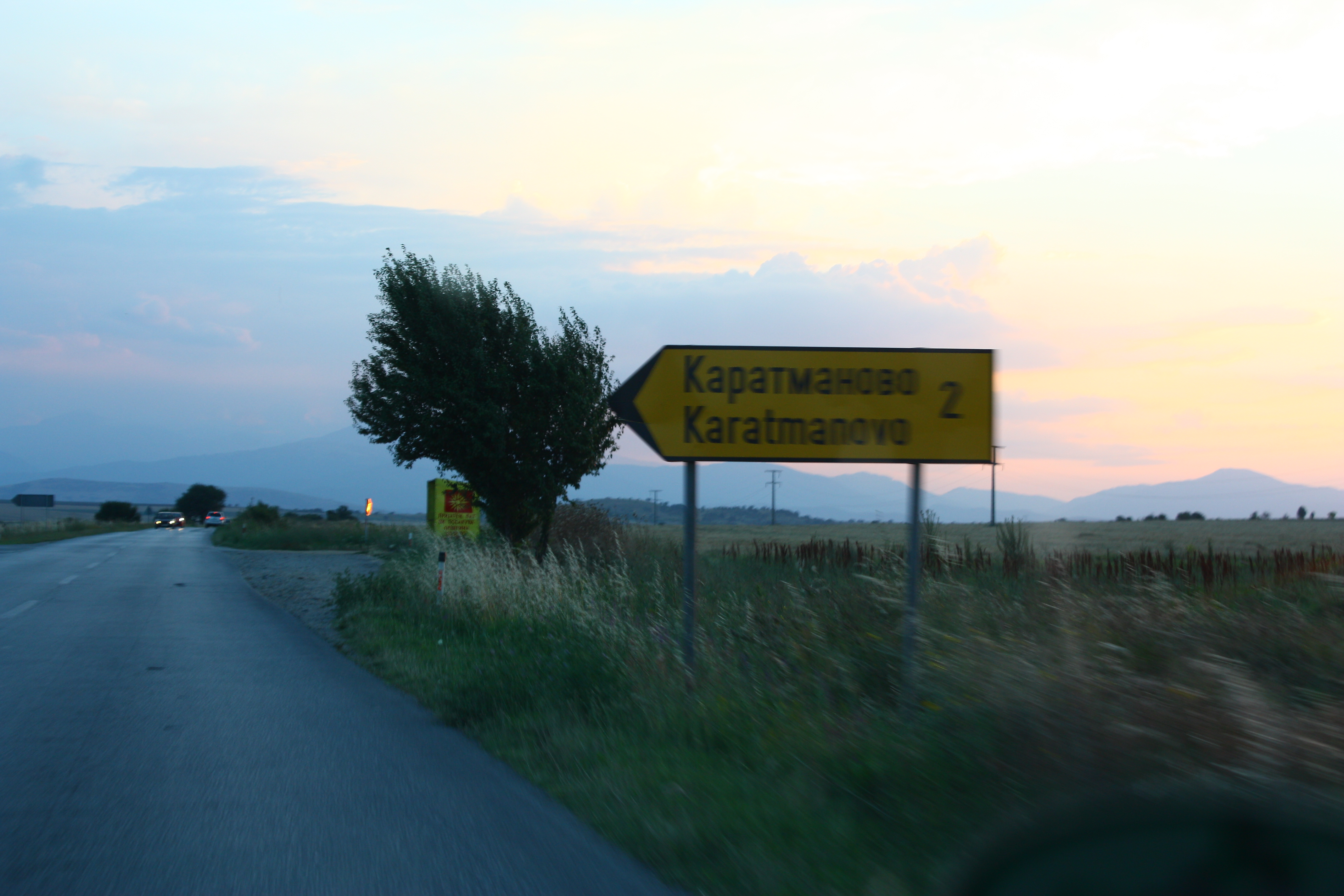 Karatmanovo